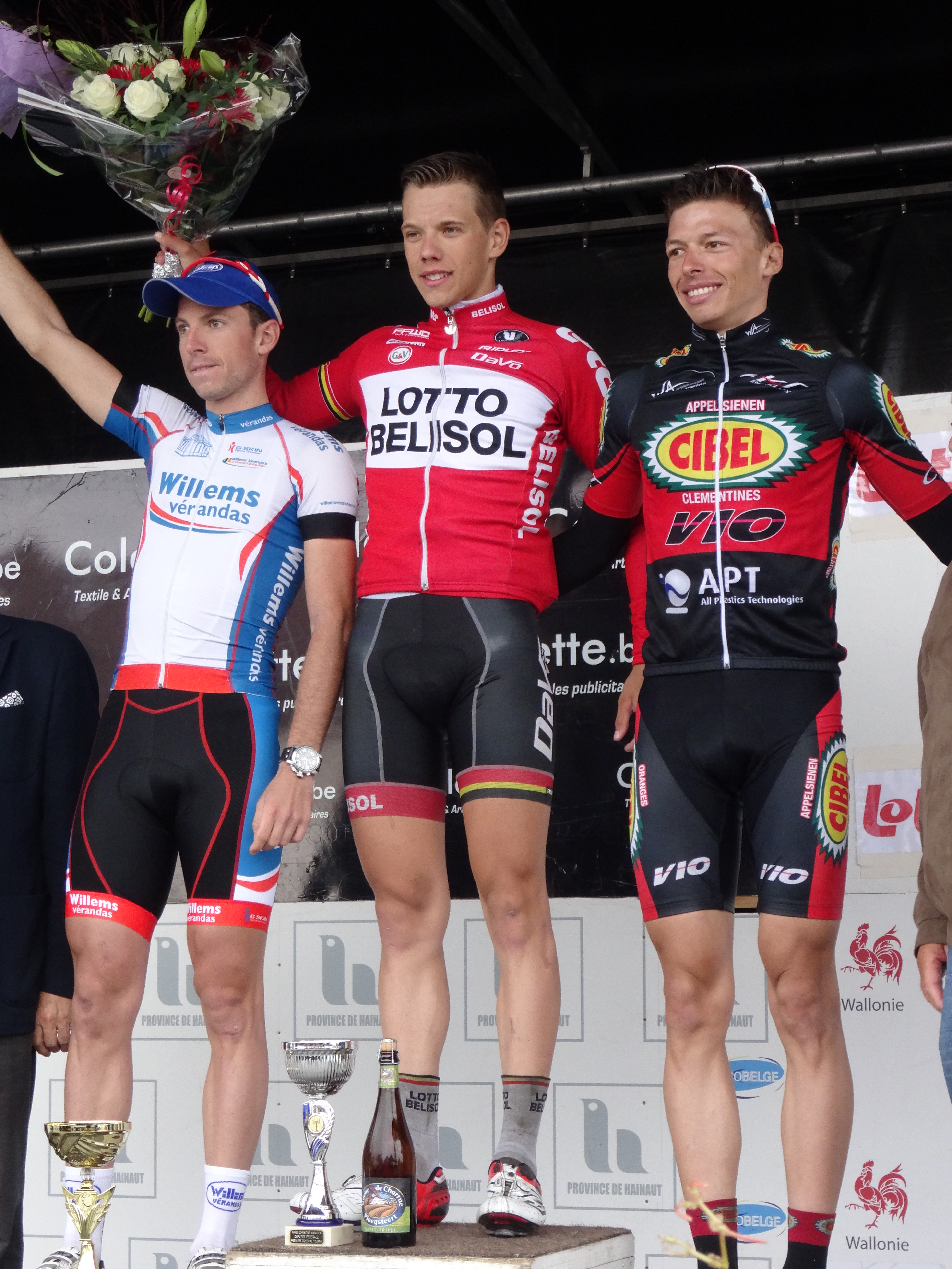 Reportage photographique réalisé le samedi 30 août à l'occasion du départ et de l'arrivée du Grand Prix des commerçants de Templeuve 2014 à Templeuve (Tournai), Belgique.